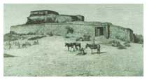 Forte Enda Jesus a Macallè (illustrazione italiana, 1895).